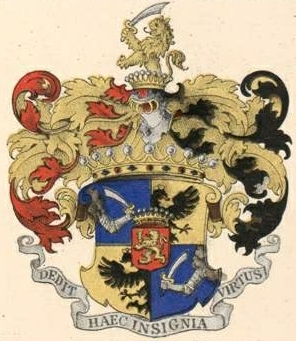 Golovkini suguvõsa krahvivapp